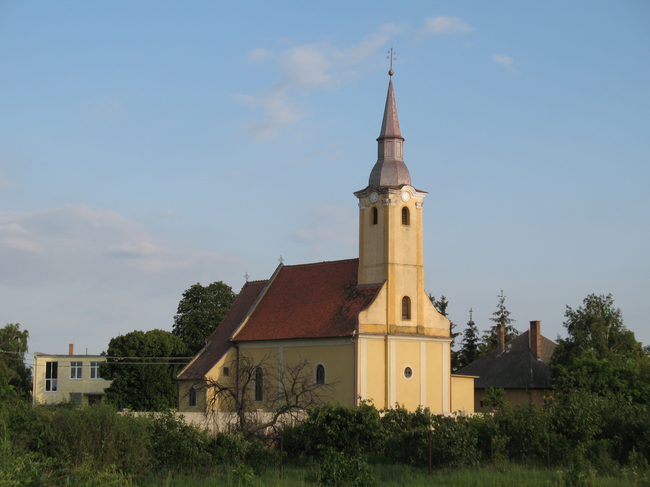 Nagyabony templom